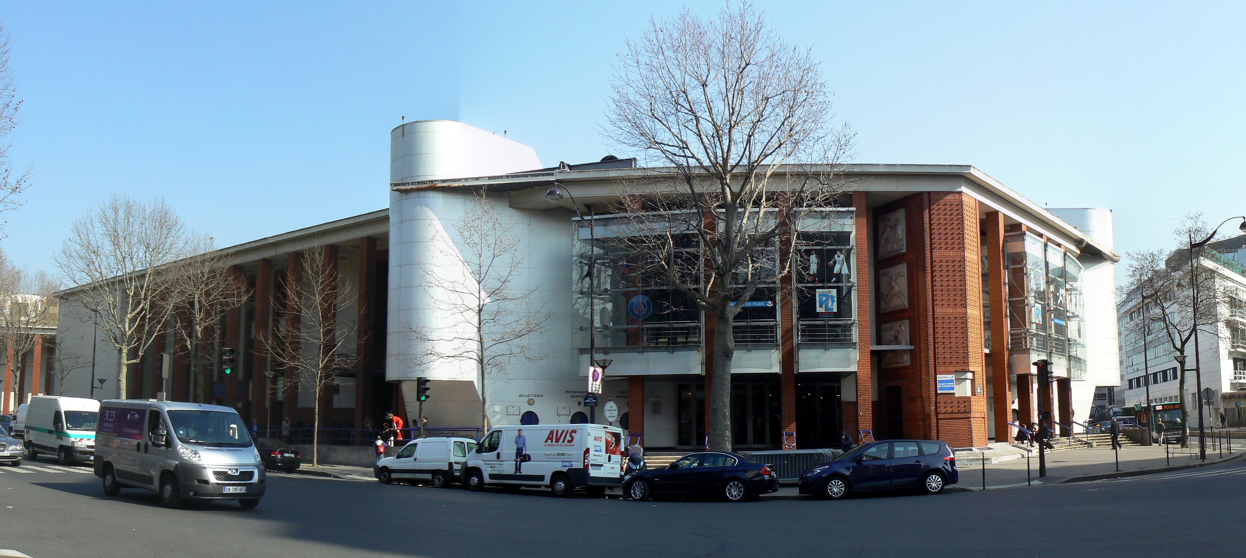 Façade du stade Pierre de Coubertin à Paris dans le 16e arrondissement